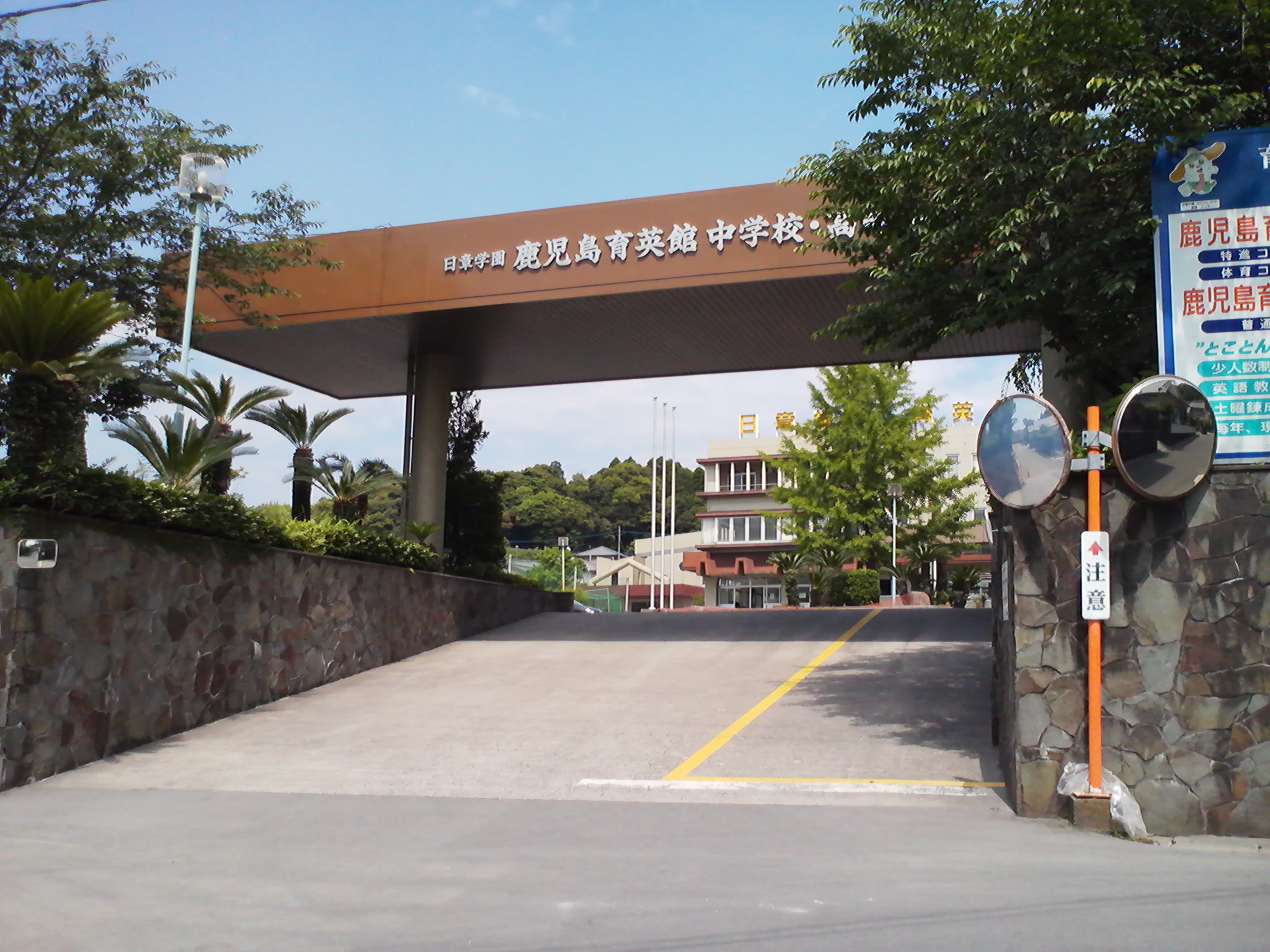 鹿児島育英館中学校・高等学校の外観